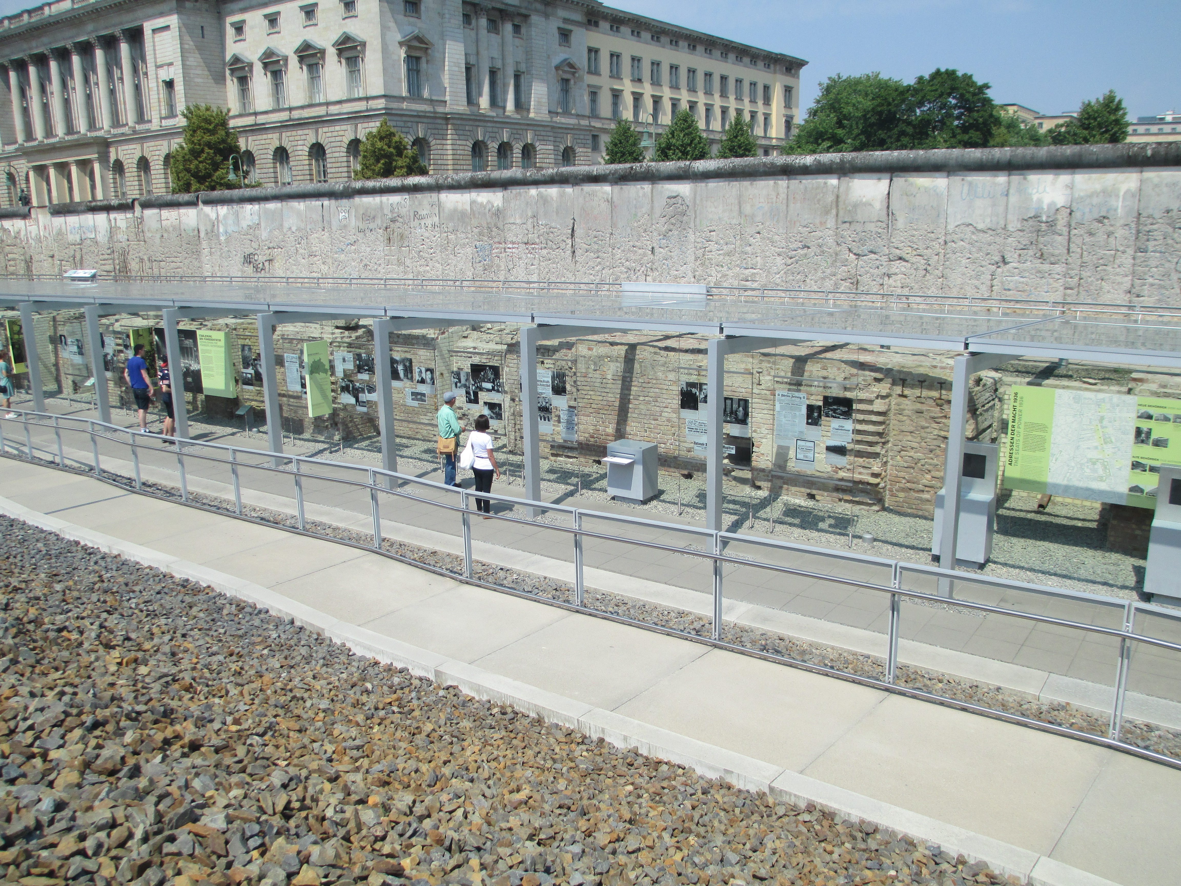 מוזיאון הטופוגרפיה של הטרור הפתוח